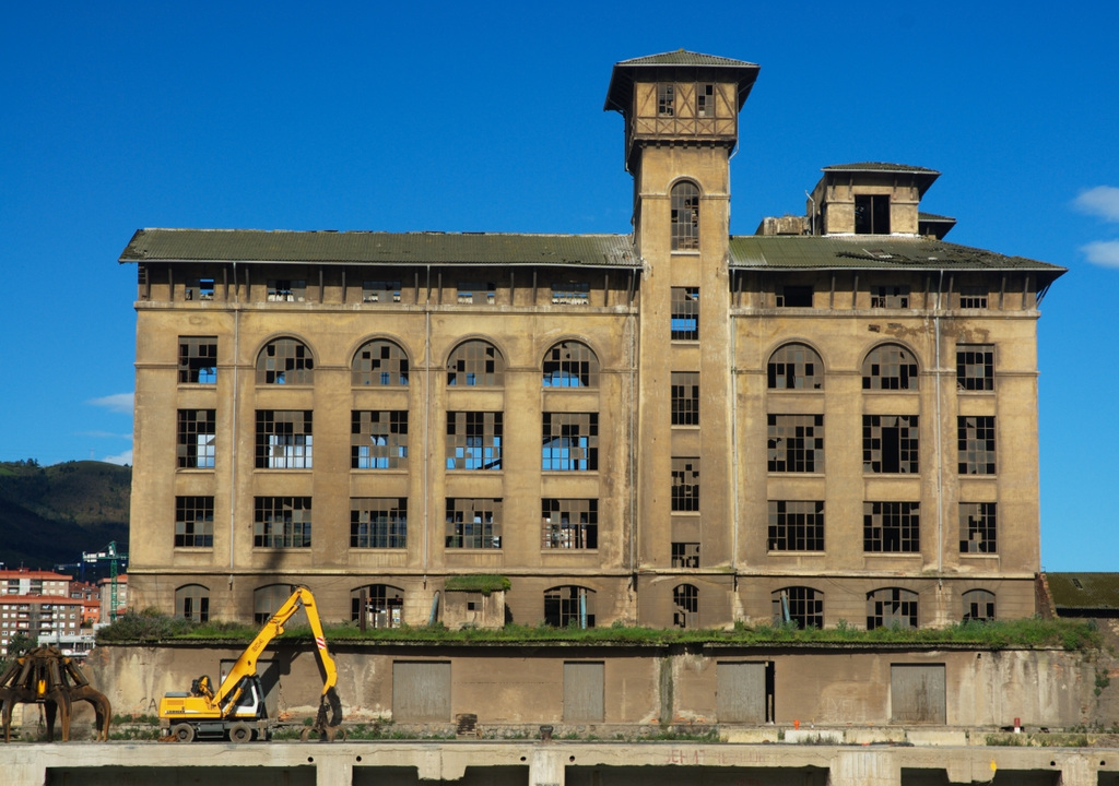 Zorrotzako Molinos Vascos irin-lantegia, 1924, Frederick Ugalde